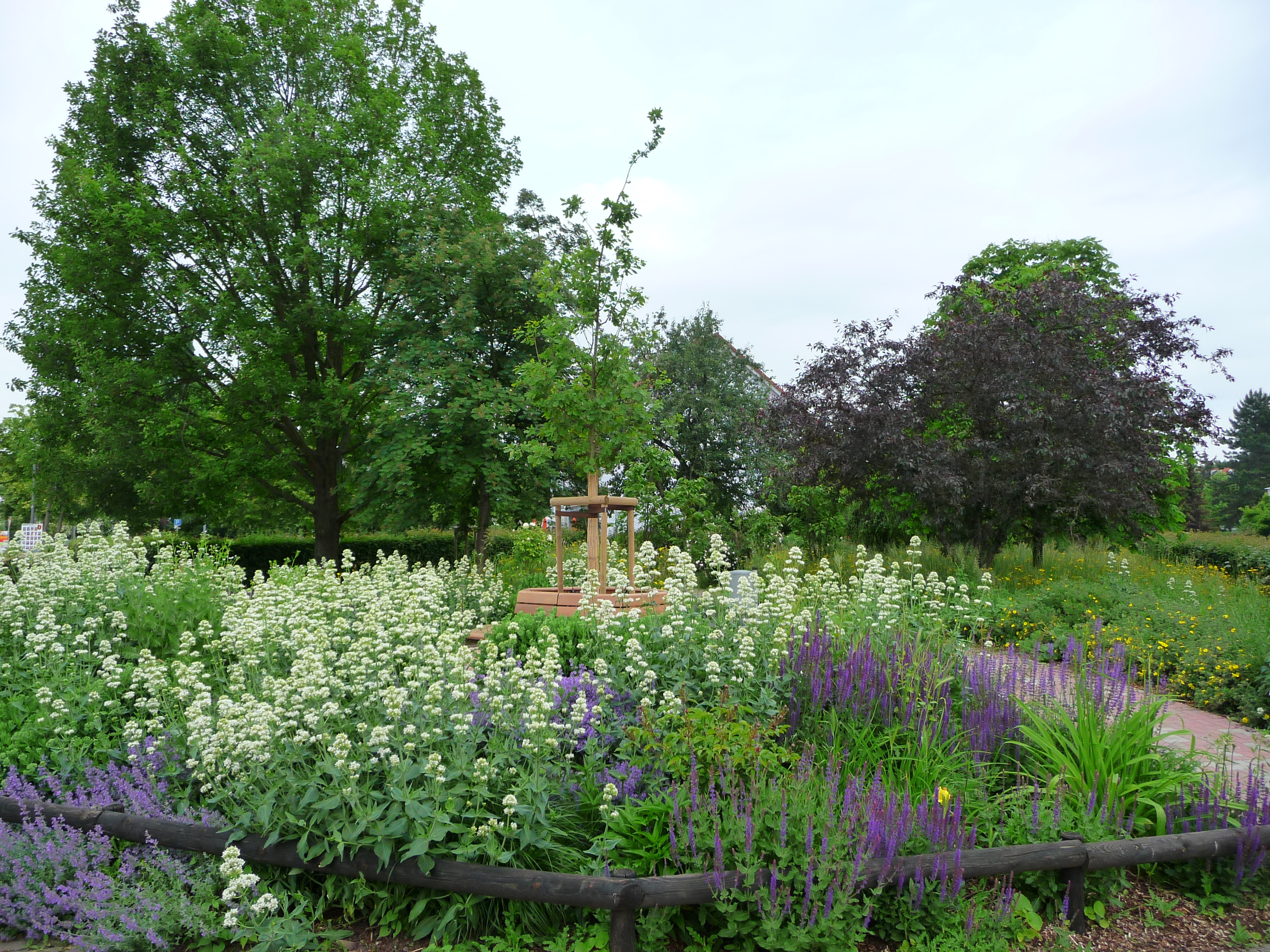 Jakob-Neu-Garten in Eppelheim Ende Mai 2009. Der Lehrer Jakob Neu hatte den Eppelheimer Gartenbauverein 1884 gegründet. Aus Anlass des 100jährigen Bestehens des Vereins wurde 1984 ihm zum Gedenken dieser kleine Garten angelegt.